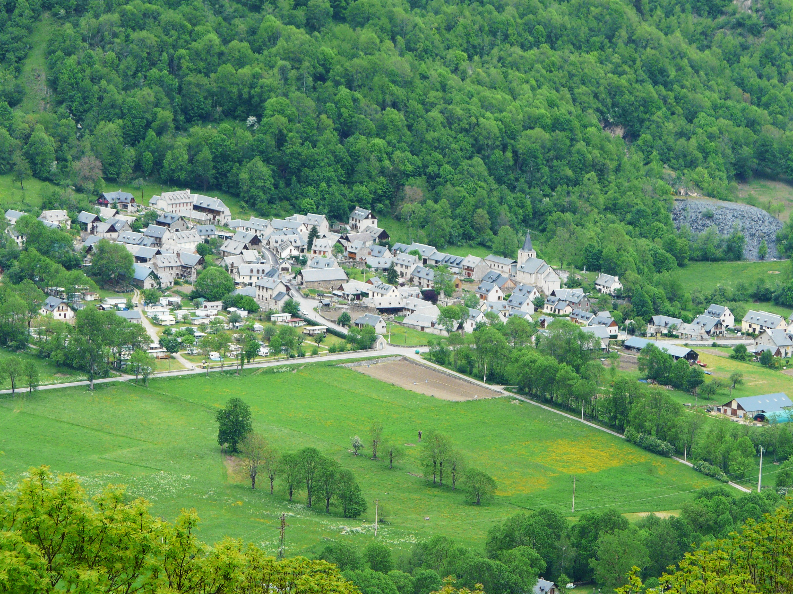 Le village d'Adervielle, Adervielle-Pouchergues, Hautes-Pyrénées, France. Vue prise depuis le village de Loudervielle.